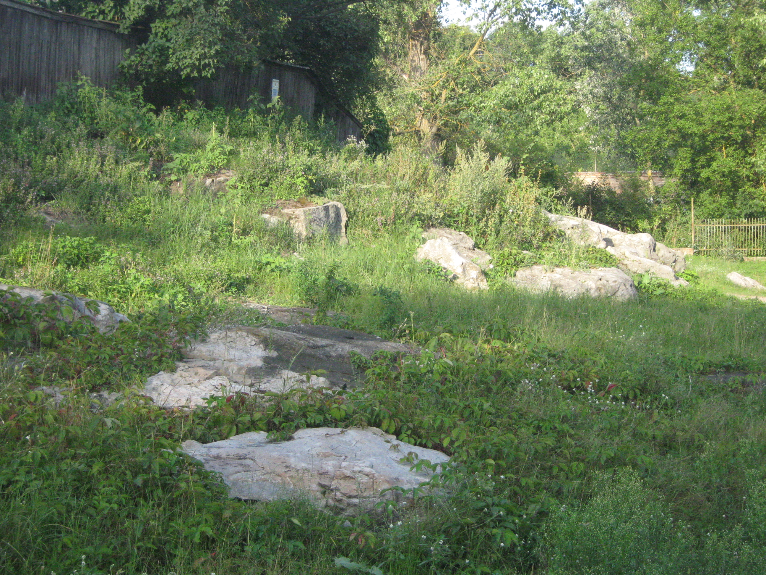 «Камінські піщаники» (у складі РЛП «Сеймський»)